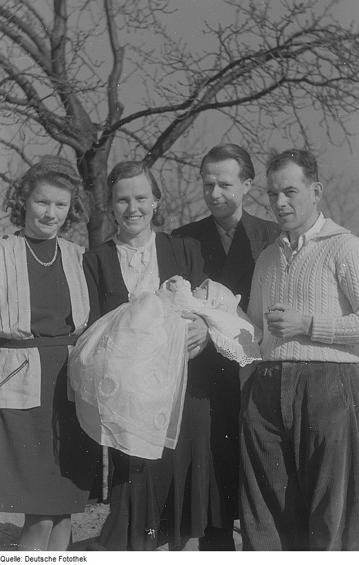 Original image description from the Deutsche Fotothek Portrait einer Familie